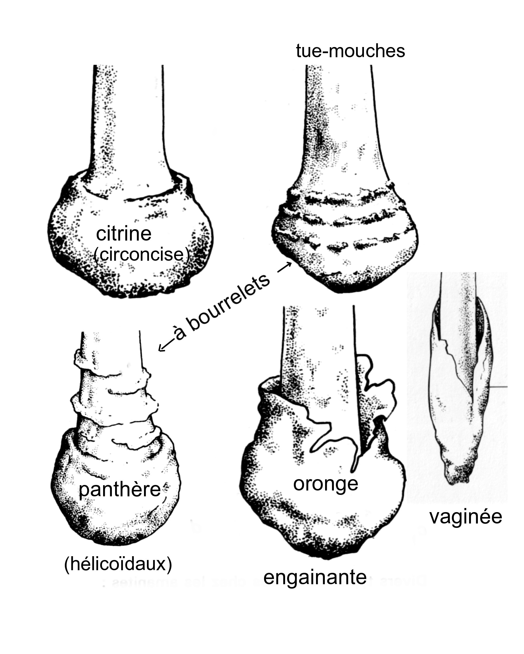 Mycologie descriptive. Reconnaître les principales amanites.